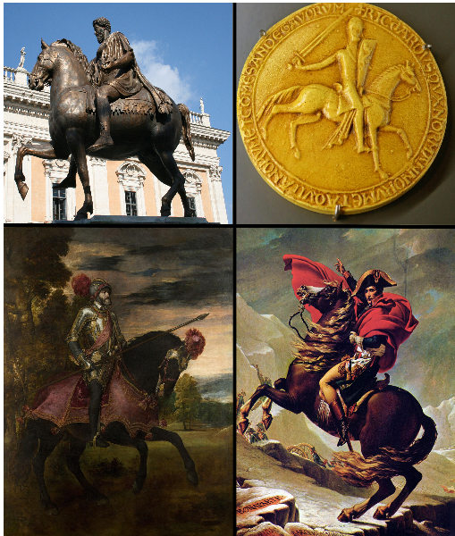 Algunos ejemplos de representaciones ecuestres de distintos soberanos en la cultura occidental. De izquierda a derecha y de arriba a abajo: el emperador romano Marco Aurelio, Ricardo I de Inglaterra, Carlos V de Alemania, Napoleón Bonaparte